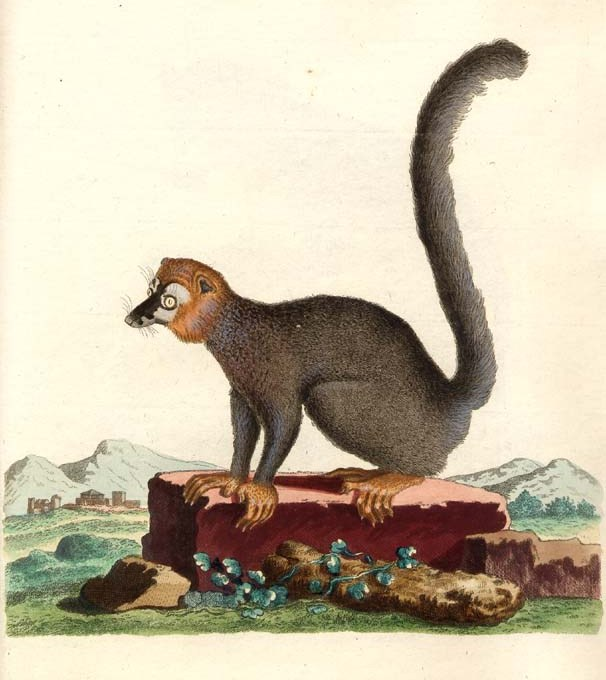 Eulemur mongoz, plate from Schreber, Johann Christian Daniel von, Histoire naturelle des quadrupèdes représentés d´après nature. Tome III. Le phoque, le chien, le chat, le putois, la loutre, la marte, l'ours, le didelphe, la taupe, la souris, le hérisson A Erlang, chez Wolfgang Walther, 1780